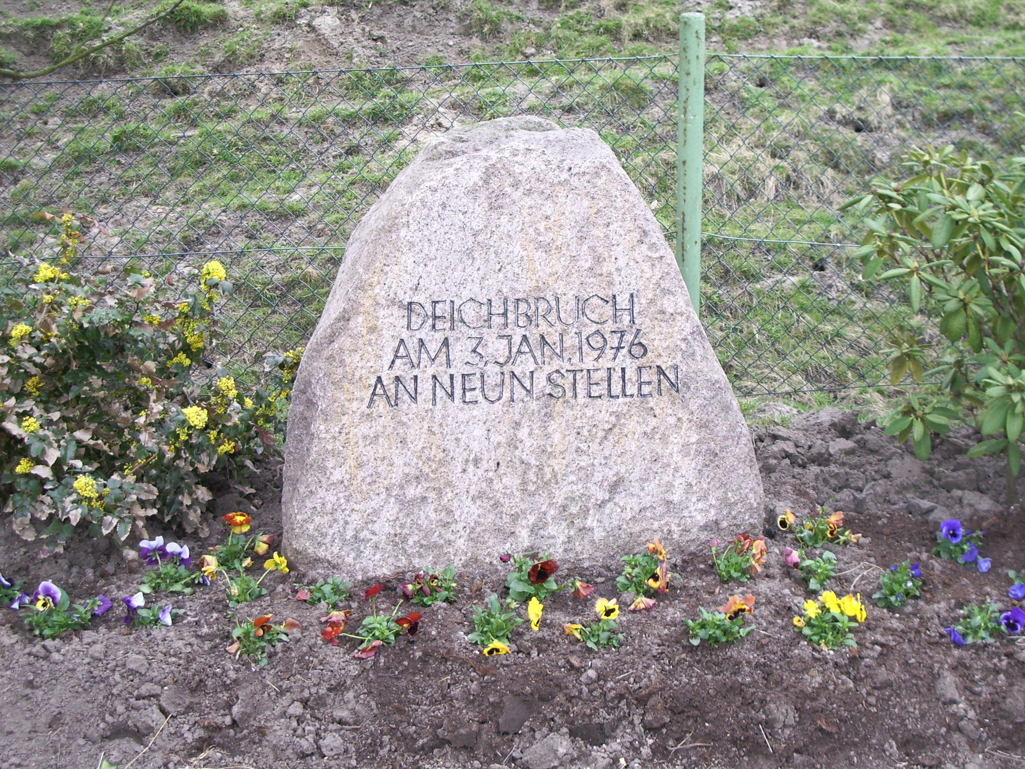 Gedenkstein in Hetlingen Text: DEICHBRUCH AM 3.JAN 1976 AN NEUN STELLEN